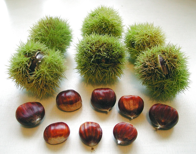 Castanea sativa - Edelkastanie (Maroni)